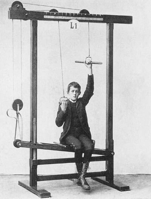 Лікування сколіозу - Густав Цандер